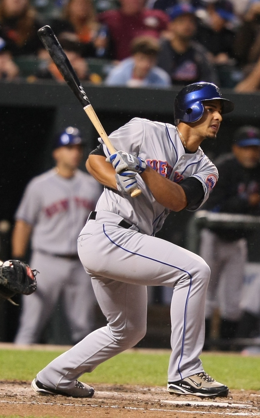 Fernando Martínez